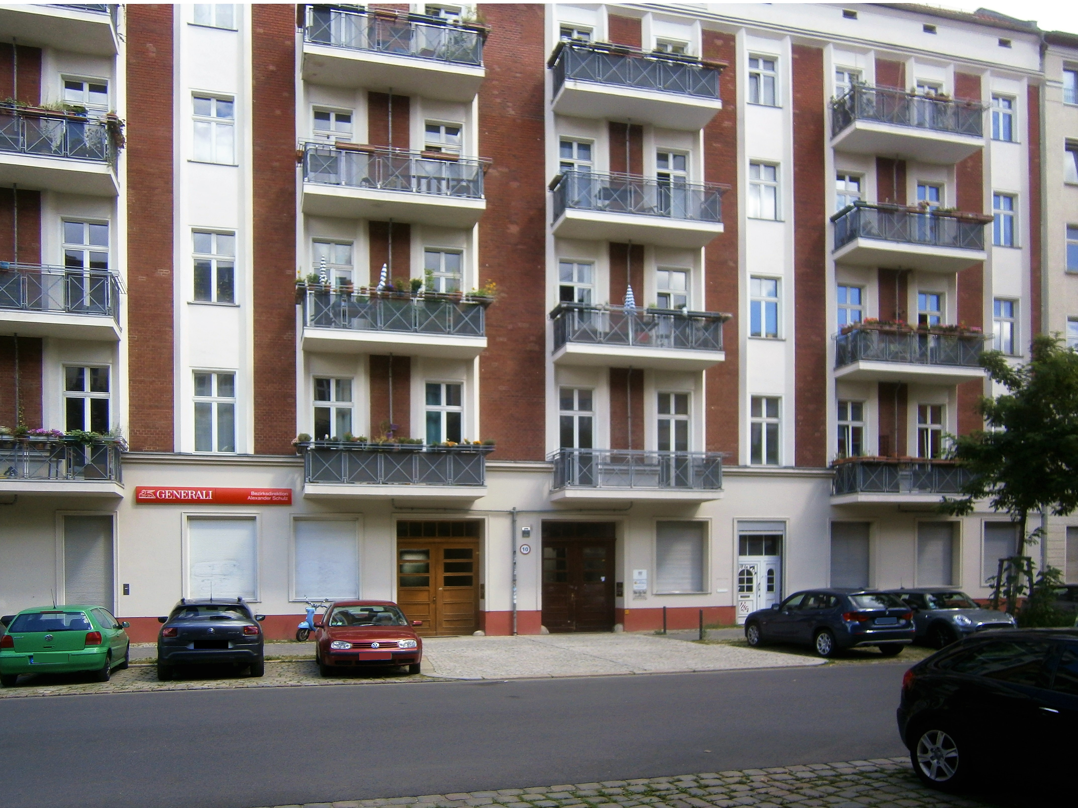 Die Marchlewskistraße ist eine Straße im Berliner Bezirk Friedrichshain-Kreuzberg, Ortsteil Friedrichshain. Angelegt und benannt wurde sie um 1870 auf dem Communicationsweg außerhalb der abgerissenen Berliner Zollmauer unter dem Namen Memeler Straße. Im Jahre 1950 erfolgte die Umbenennung in Marchlewskistraße. Schwere Schäden an der Bebauung bei Luftangriffen im Zweiten Weltkrieg brachten beim Neuaufbau Änderungen, jedoch der Straßenlauf blieb erhalten. Das Bild zeigt das (Doppel-)Haus Marchlewskistraße 89-91.